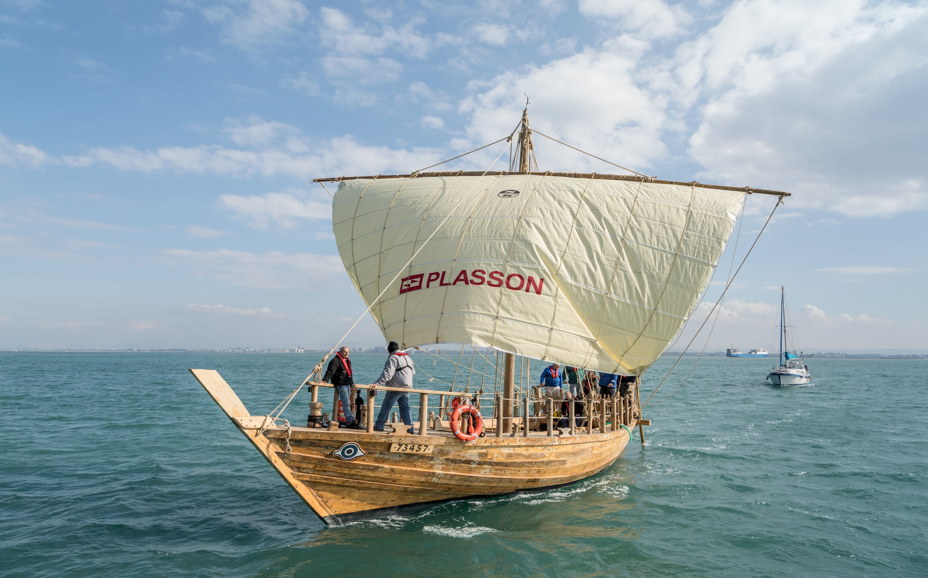 ספינת הרפליקה של הספינה העתיקה במעגן מיכאל בהפלגה ראשונה במפרץ חיפה .